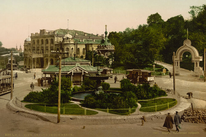 Царская (ныне Европейская) площадь в Киеве